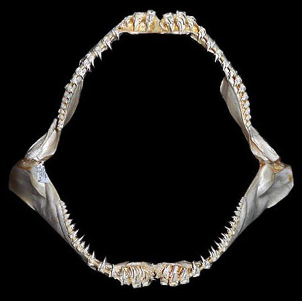 Odontaspis noronhai